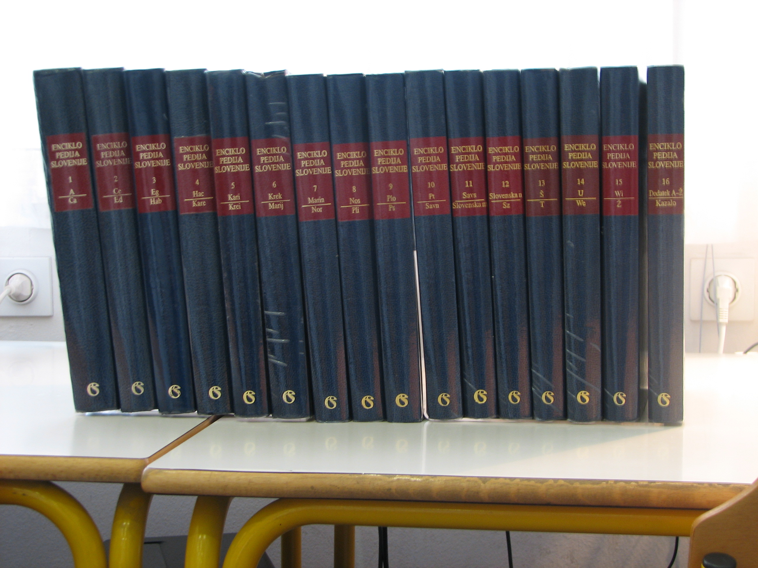 Enciklopedija Slovenije, photo taken in municipal library of Zagorje by romanm (talk) on 5th November 2005.